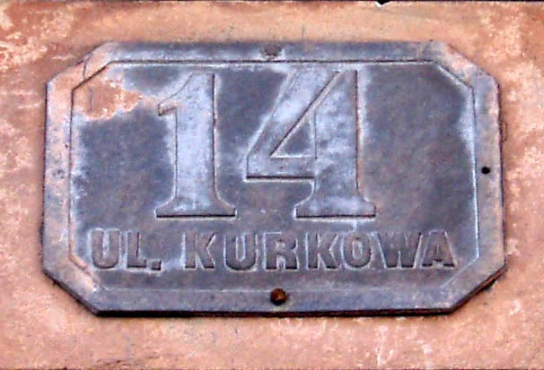 Табличка зі старою назвою вулиці на будівлі Бурси народного дому у Львові, на вул. Лисенка, 14